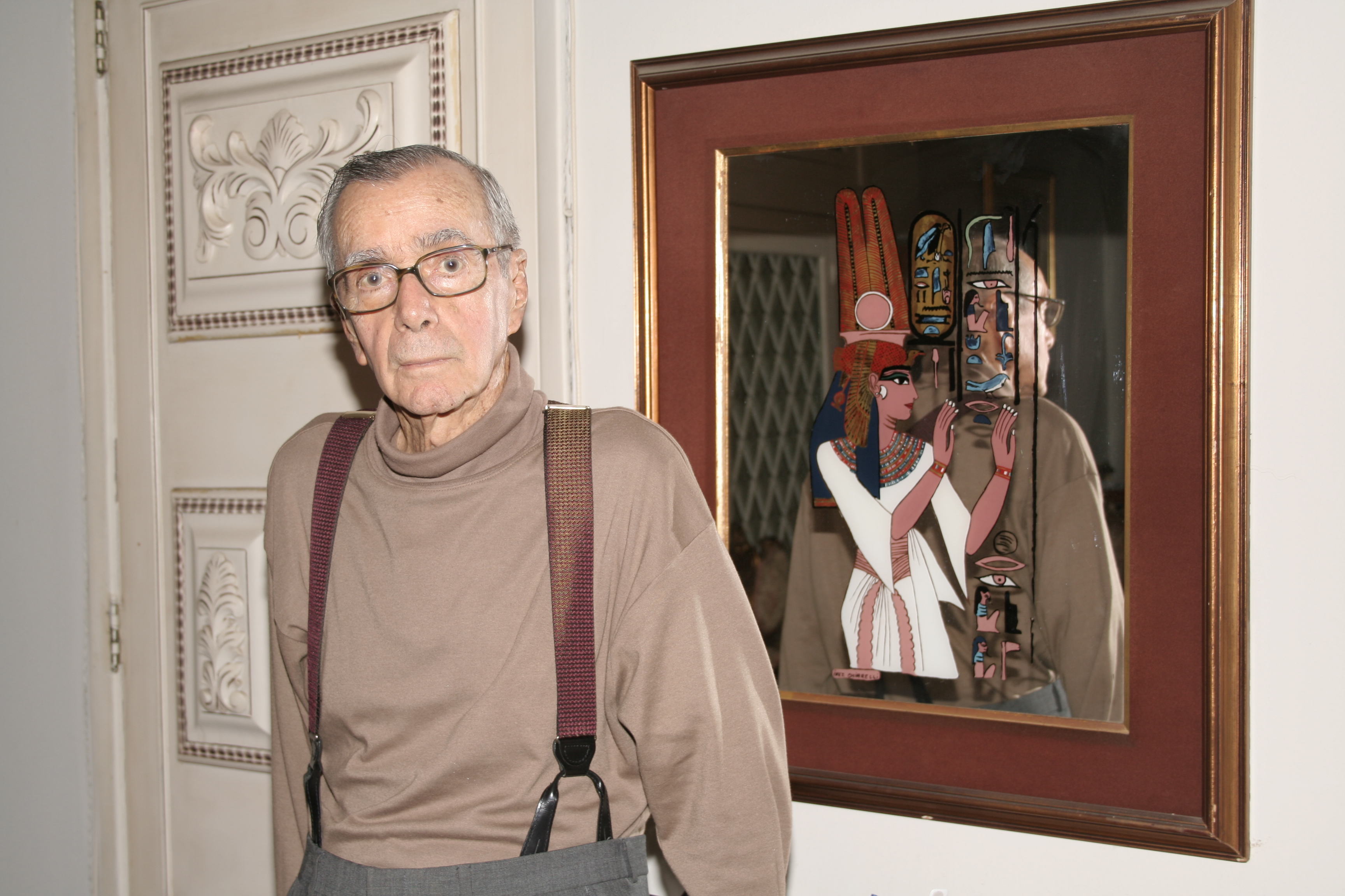 Foto do escritor Herminio C. Miranda